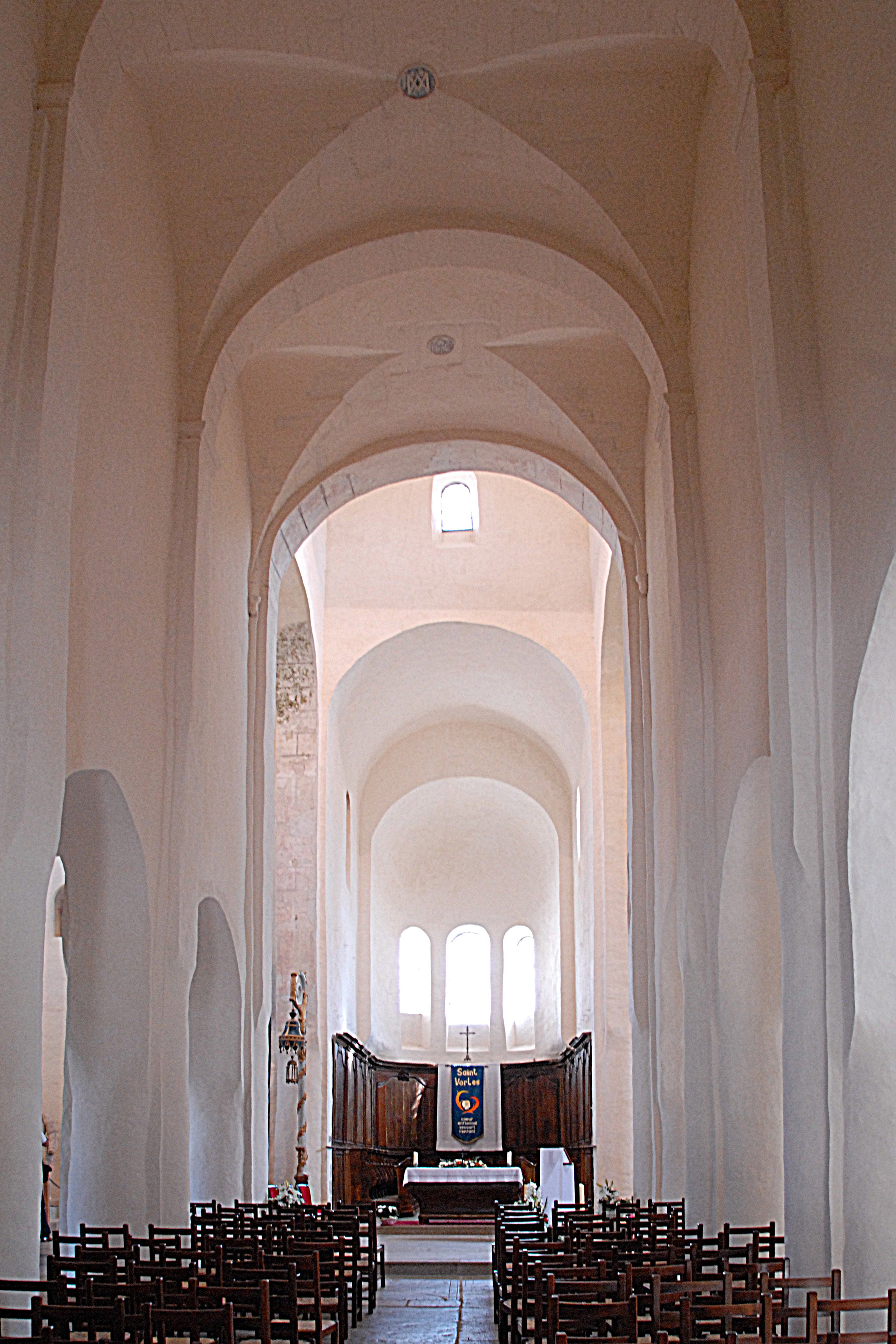 St-Vorles de Châtillon-s-S, Langhaus zum Chor